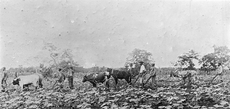 Togo, Pflügen eines Baumwollfeldes Pflügen in der Baumwollschule von Nuatschä/ Afrika-Togo